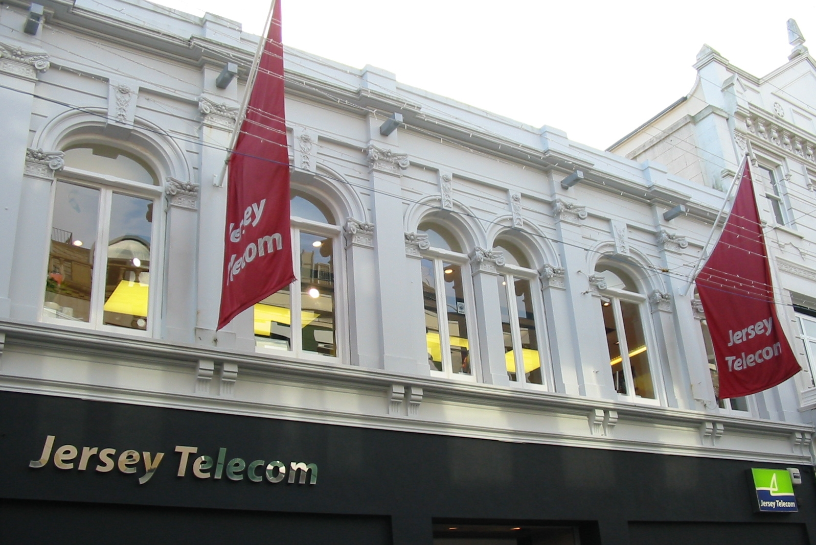 Nrf: Saint Hélyi, Jèrri